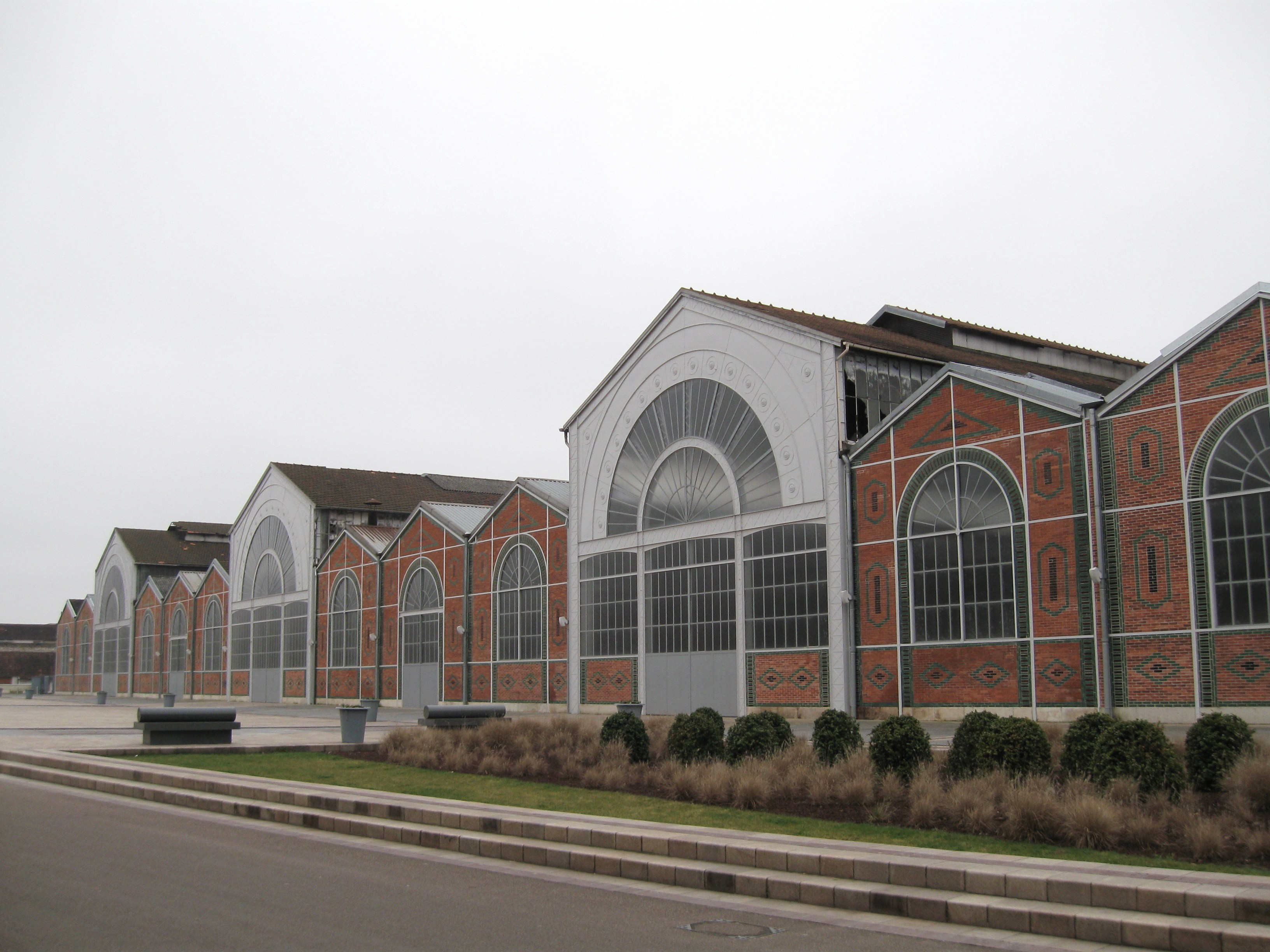 Anciennes usines de la Société Française de Matériel Agricole et Industriel, Vierzon, Cher, France.